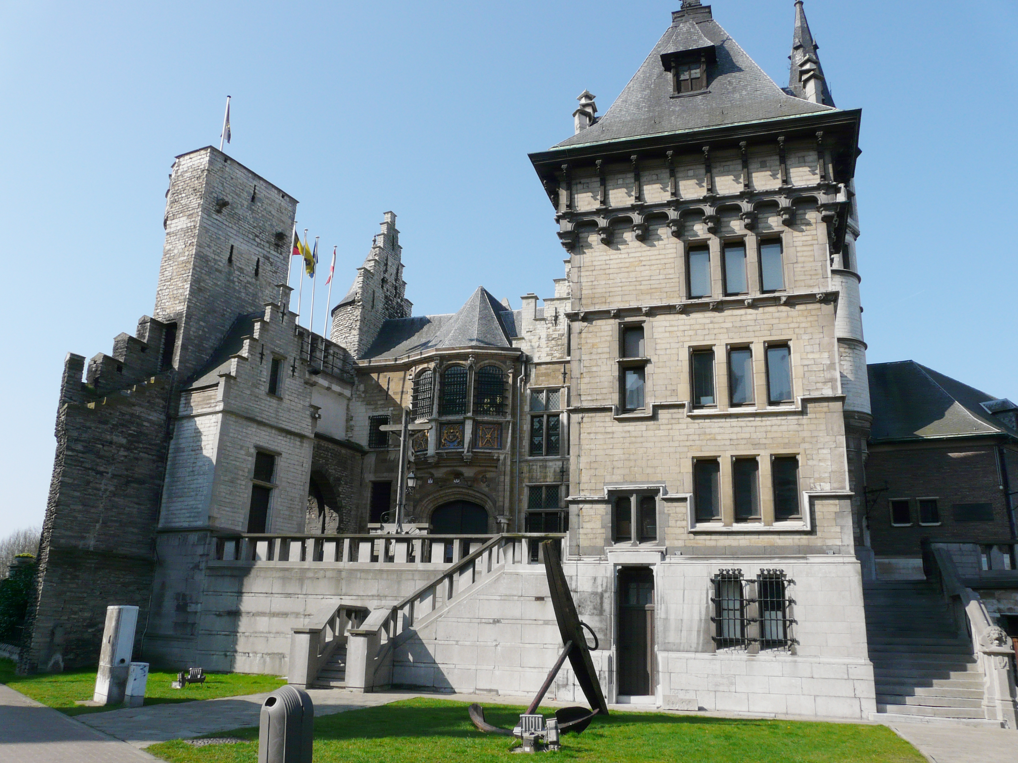 Achterzijde het Steen bij de Schelde in Antwerpen